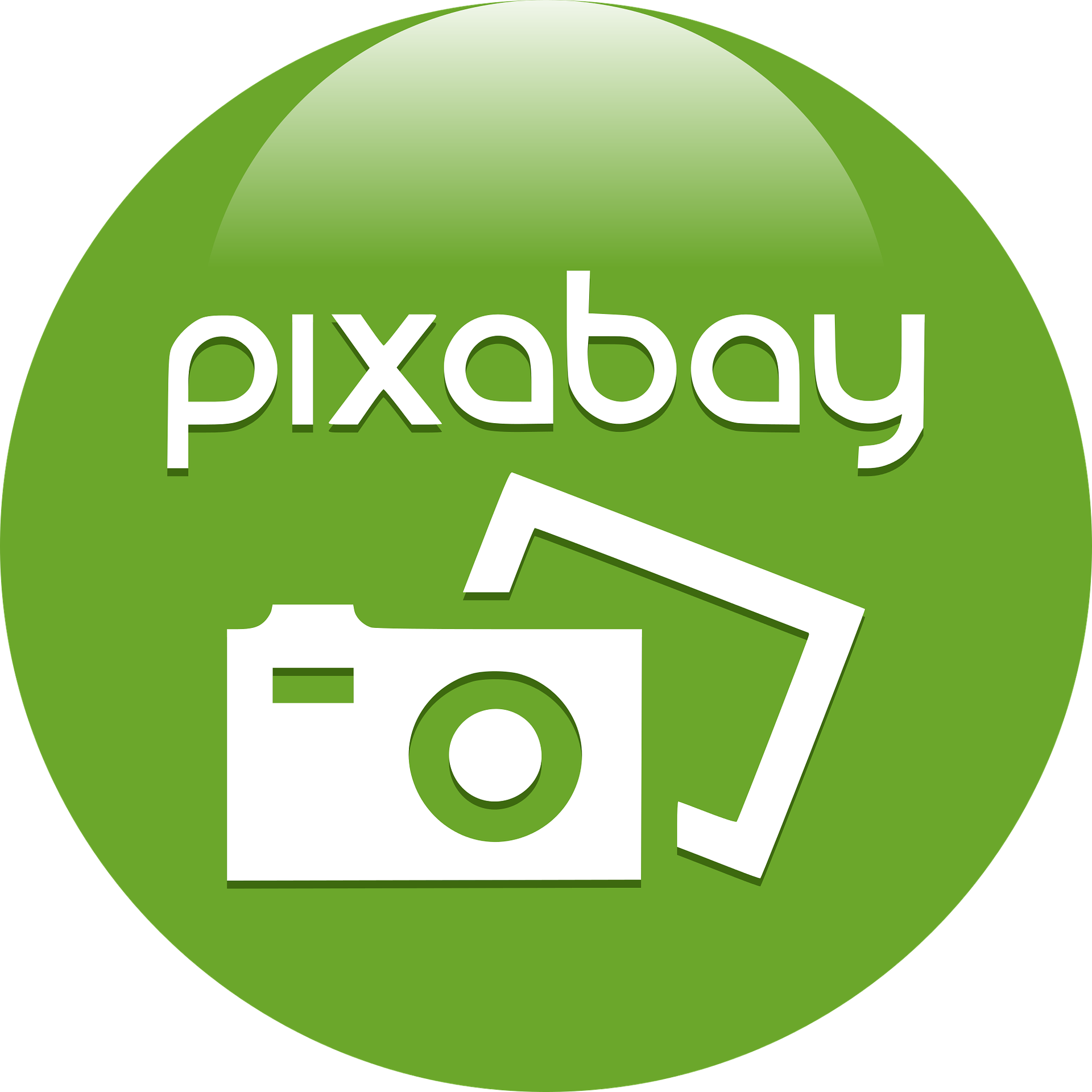 Logotipo inoficial del sitio web Pixabay.